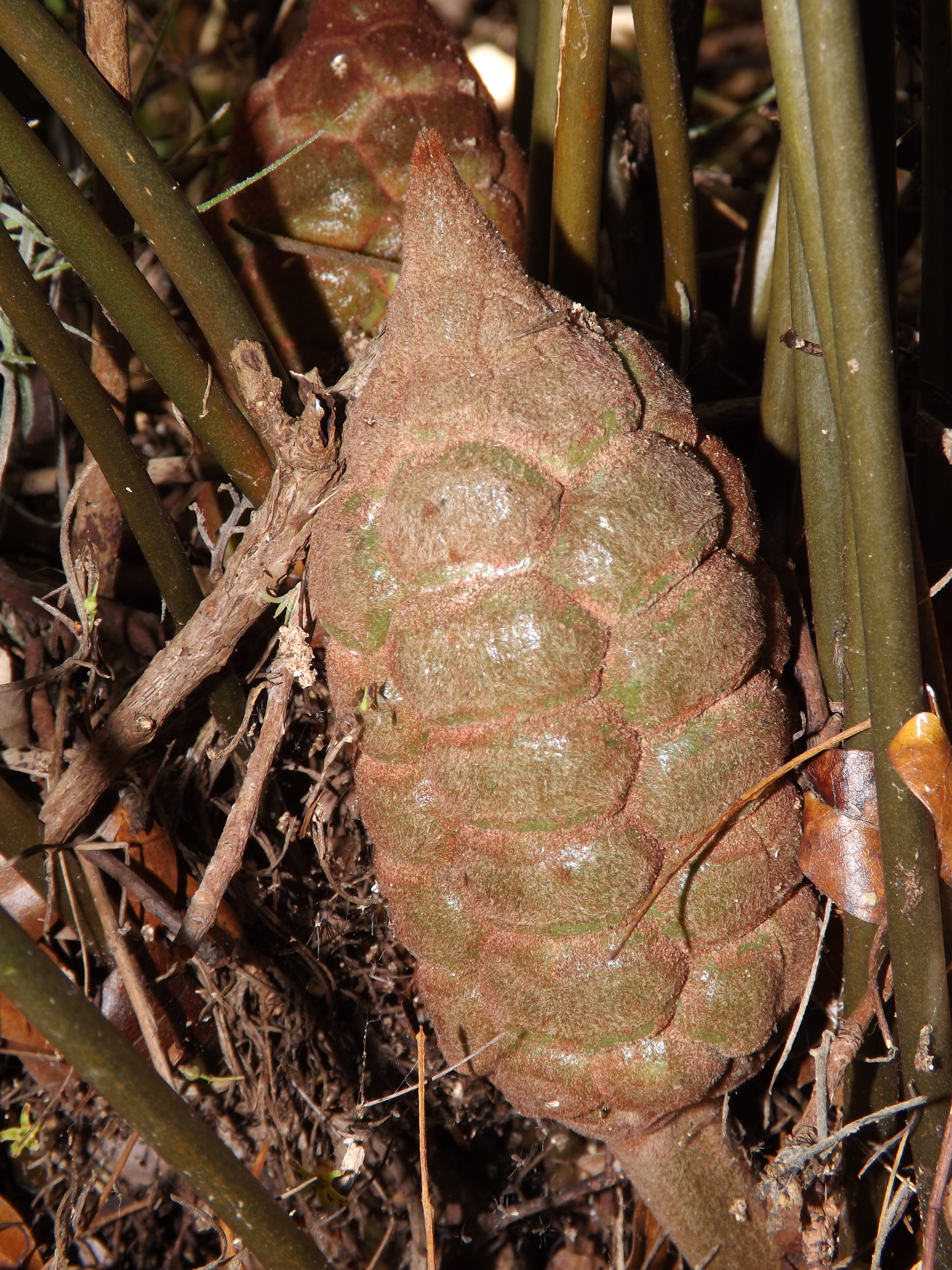 Cono hembra, Peñuelas, Puerto Rico